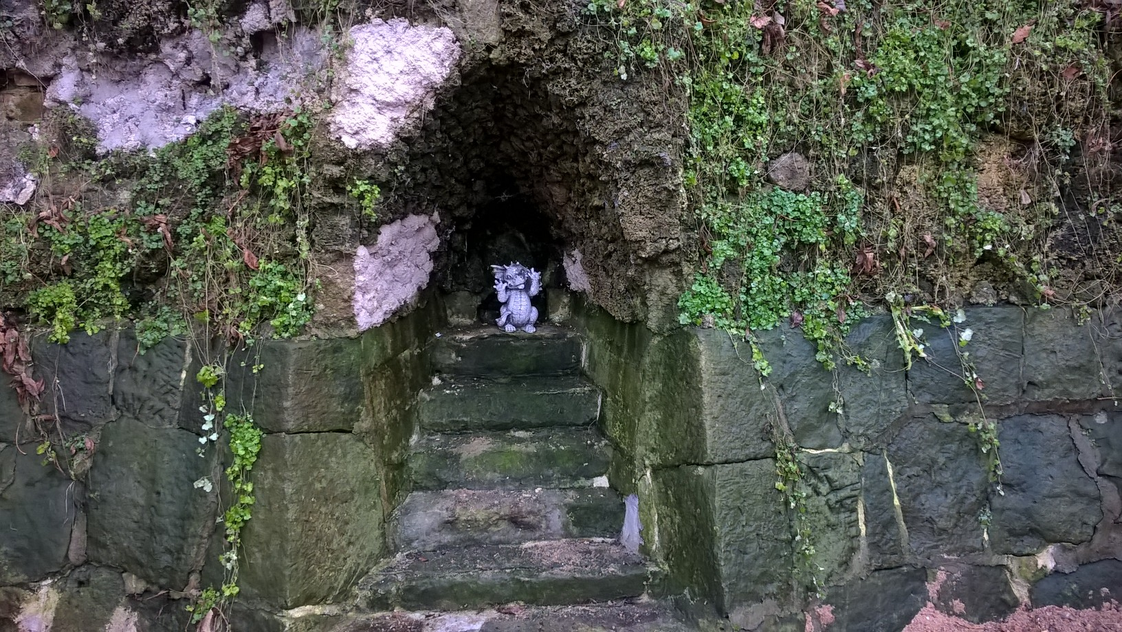 Sztuczna grota zbudowana w zabytkowym Parku Goepperta w Szprotawie (niem. Sprottau)